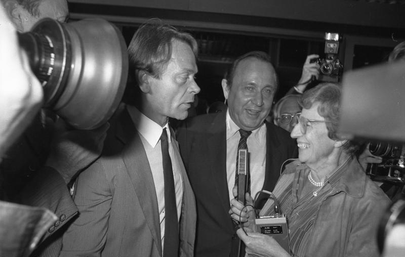 Bundestagswahl: Wahlparty im Bundeskanzleramt